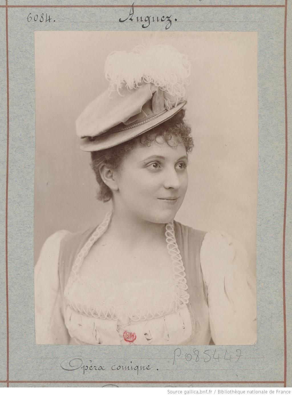 Mathilde Auguez, chanteruse à l'Opéra-Comique ; xxtrait de : album de l'Atelier Nadar. Vol. 31